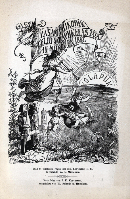 Titelseite eines vierseitigen Faltblatts mit dem Programm für den 2. internationalen Kongress der Volapükisten in München (6. - 9. August 1887)